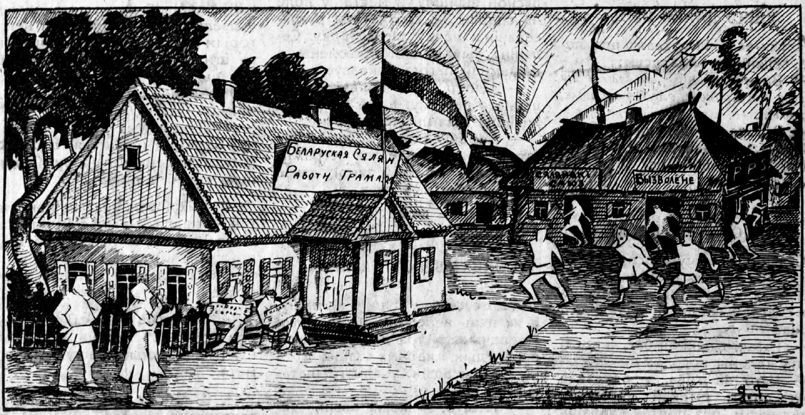 Беларуская (тарашкевіца): Выява з часопіса Маланка №13, 1926. Сяляне ўцякаюць з П.П.С., Вызваленьня, Сялянскага Саюзу і ўступаюць у БСРГ.